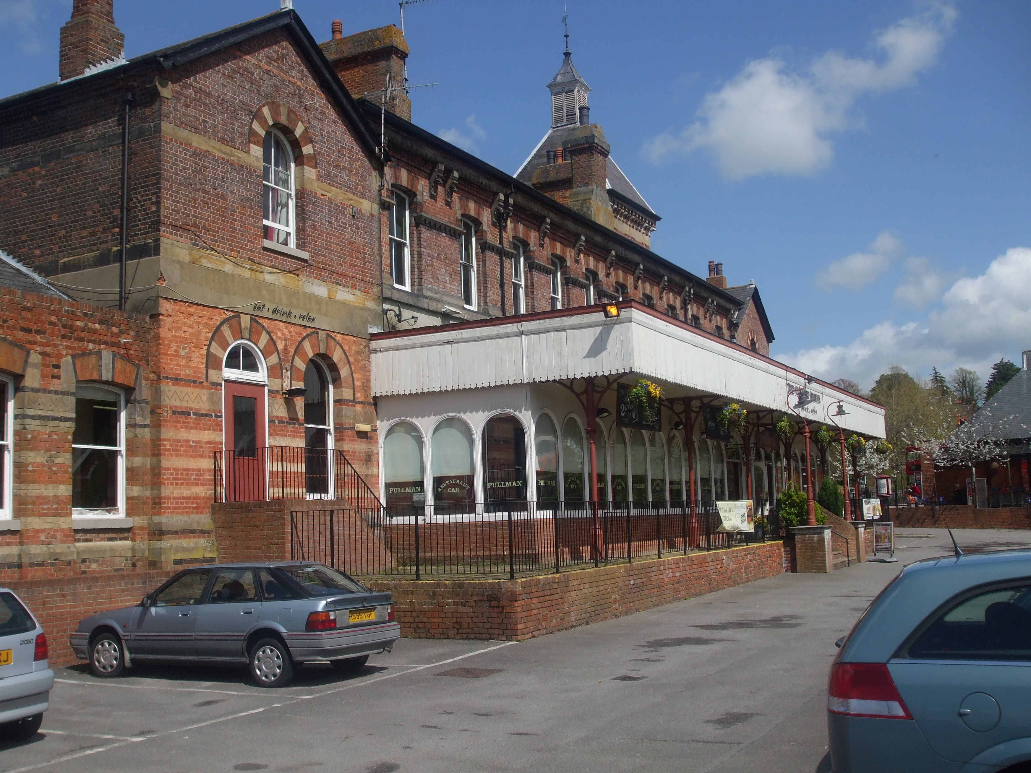 Tunbridge Wells West Station, Kent